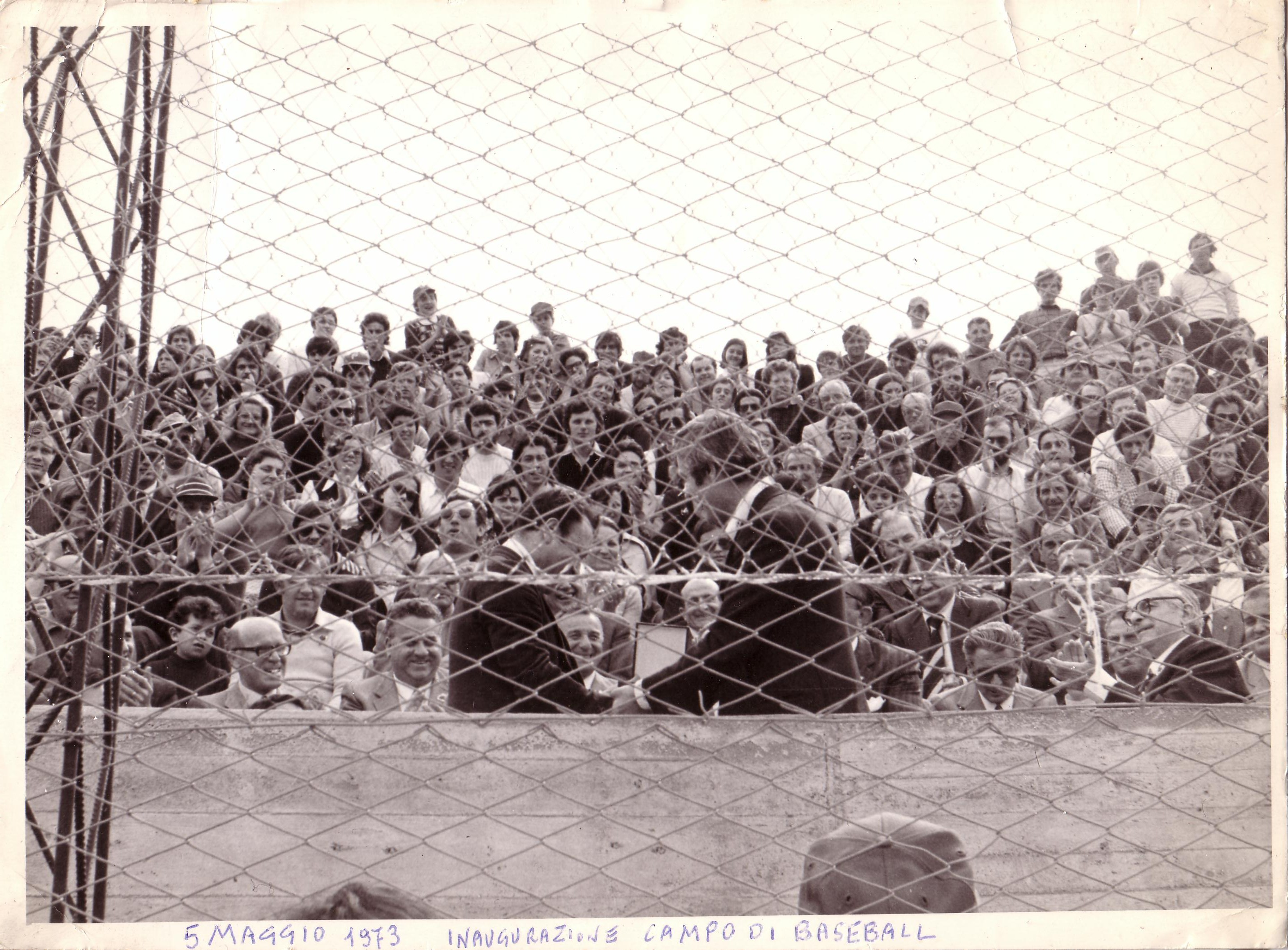 Inaugurazione Stadio "Roberto Jannella" consegna delle chiavi all'Avvocato Ripani, da parte del Segretario del BBC Grosseto Rag. Giuseppe Boni